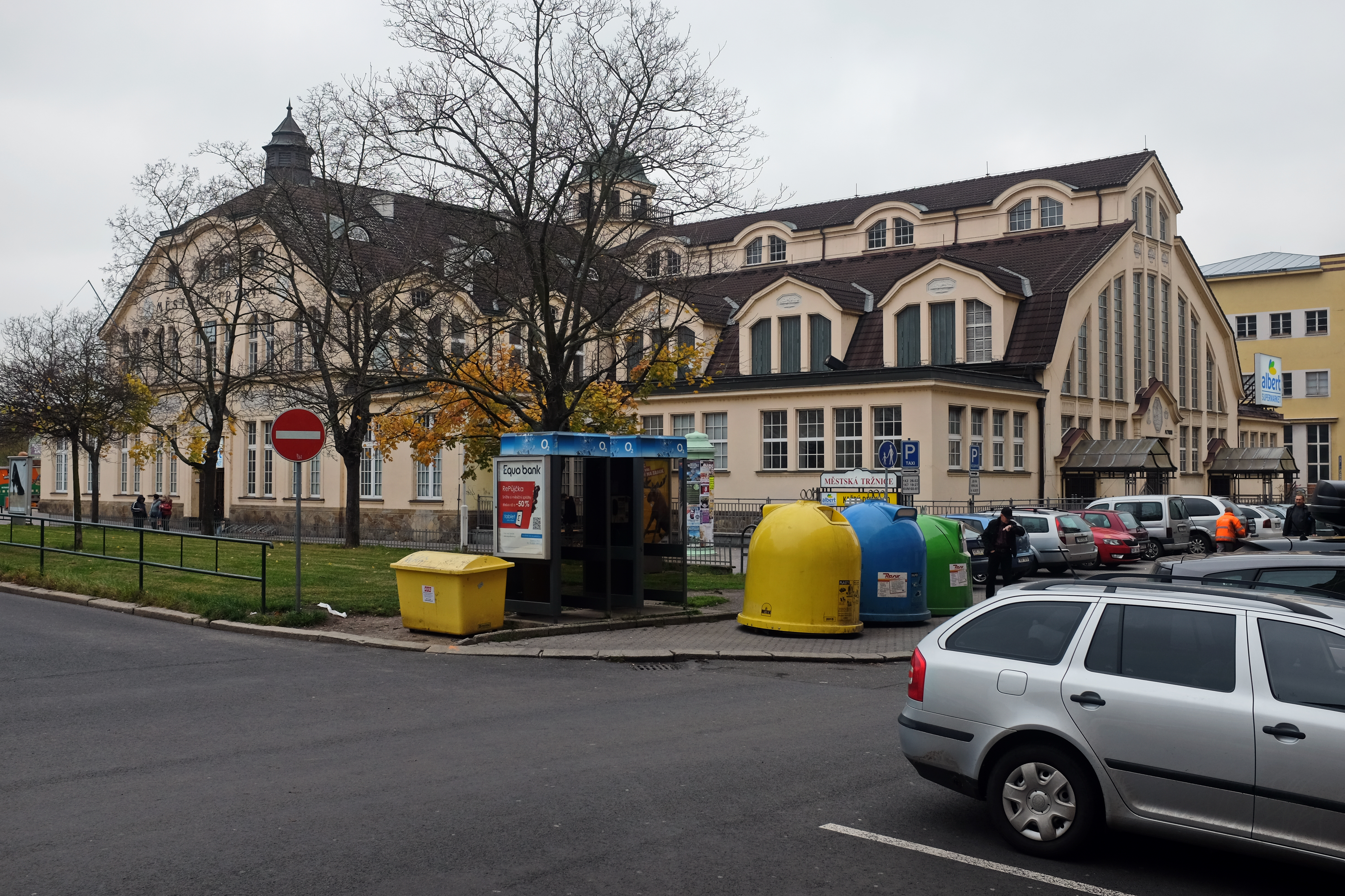 Tržnice, Horova 1223/1, Karlovy Vary.